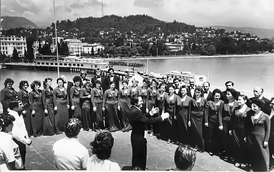 1983 год